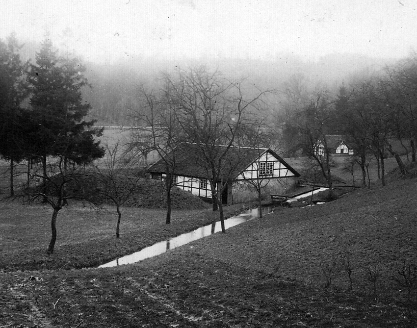 ehemalige Pulvermühle bei Gut Schiff in Herrenstrunden